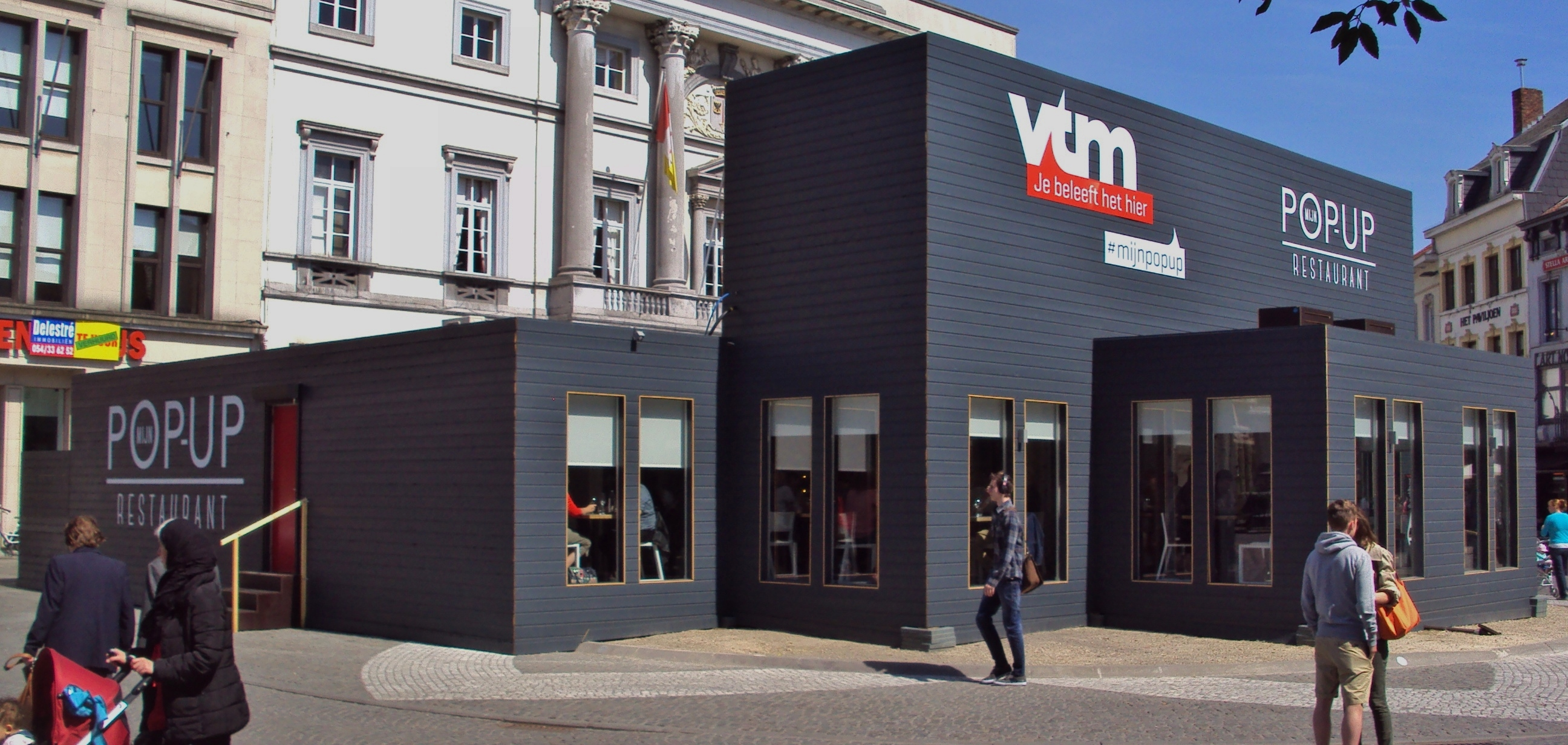 Pop-uprestaurant te Aalst (Oost-Vlaanderen, België) van het VTM-televisieprogramma Mijn Pop-uprestaurant